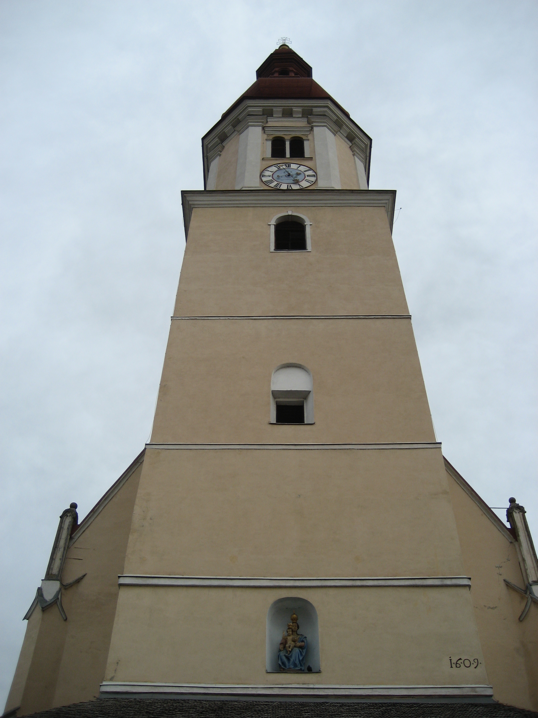 Wallfahrtskirche Maria Trost in Fernitz, Steiermark, Österreich / Church Maria Trost in Fernitz, Styria, Austria